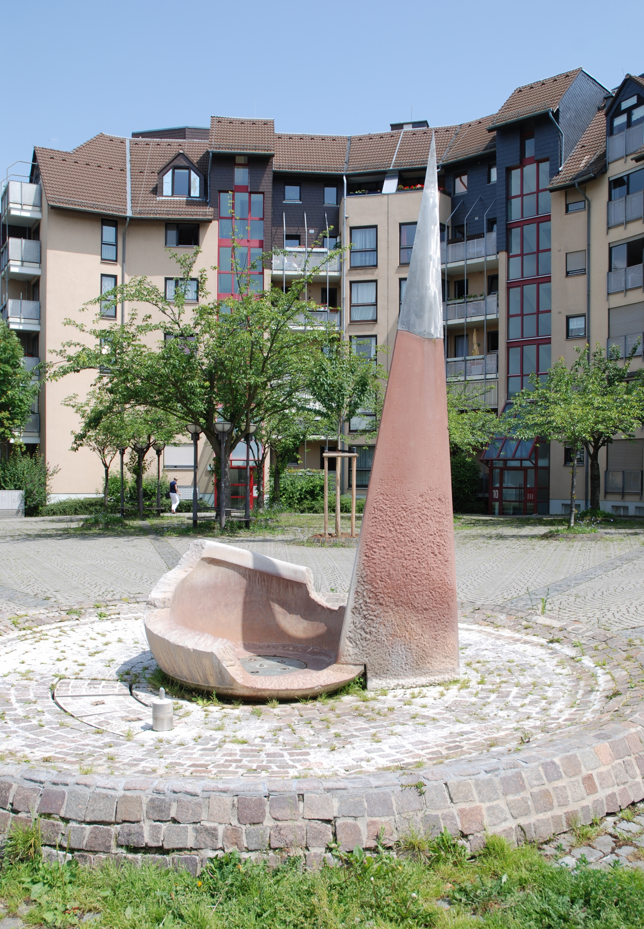 Erwin Mosen: Brunnen (1994). Eine in den Himmel weisende dreiseitige Pyramide aus rotem Sandstein mit einer Spitze aus Edelstahl, nachempfundenes Fragment einer Keramikschale. Die Brunnenanlage nimmt Bezug darauf, dass an diesem Ort, neben Grabstätten, zahlreiche Waffen, Pfeilspitzen und zerbrochene Keramikgefäße aus fränkischer Zeit gefunden wurden. Standort: Auf dem Hewwel, Rieslingstr. Ecke Am Kühborn (Frankenhöhe), Mainz-Hechtsheim